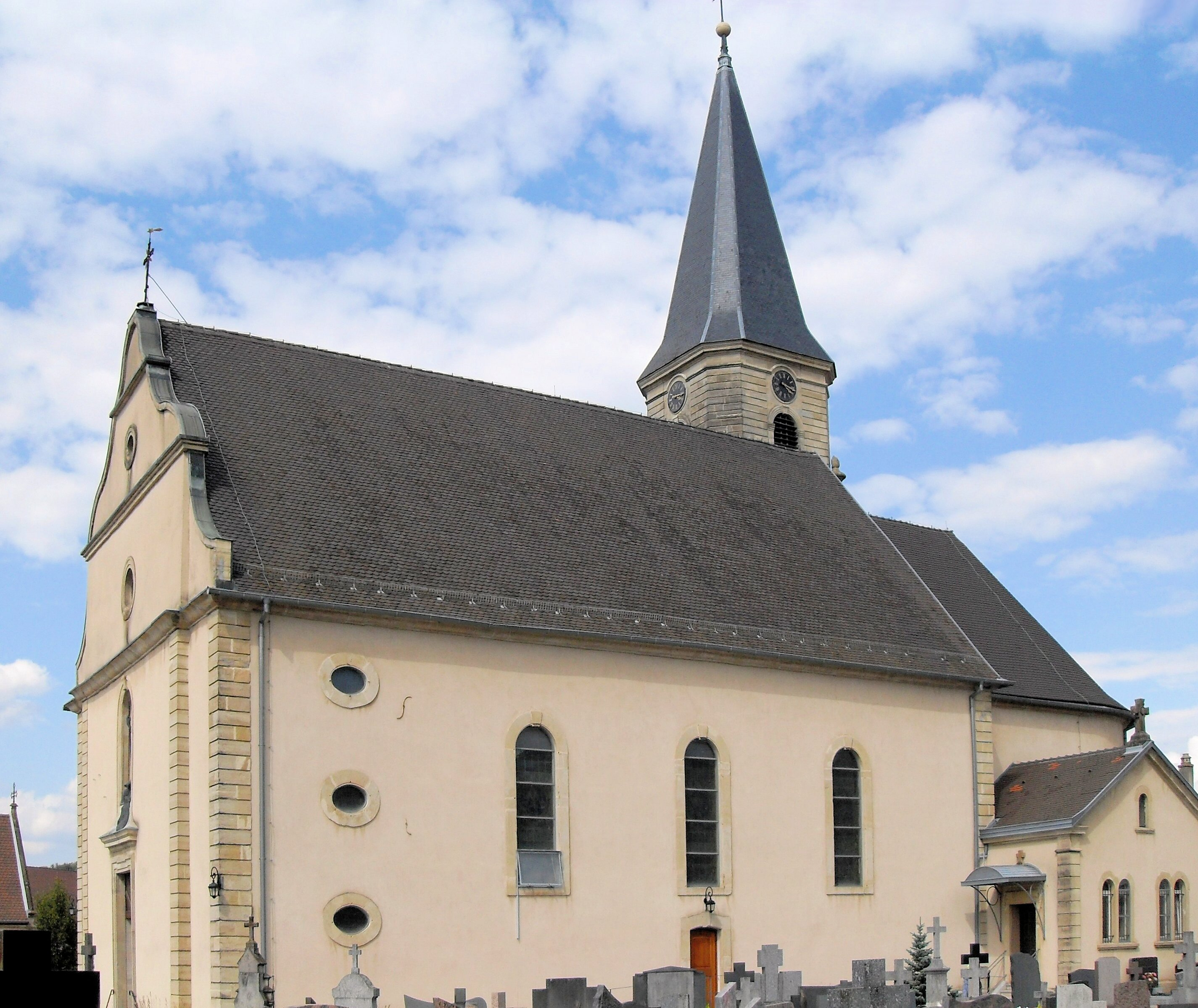 L'église Saint-Jean-Baptiste à Hirsingue